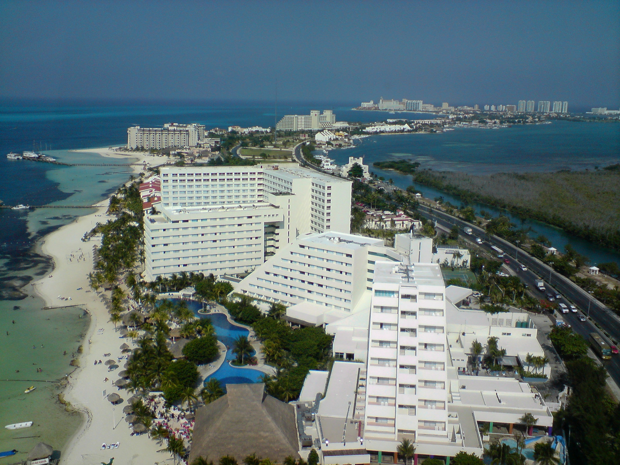 Vista aérea de Isla Cancún, desde lo alto de la Torre Escénica a más de 80m de altura